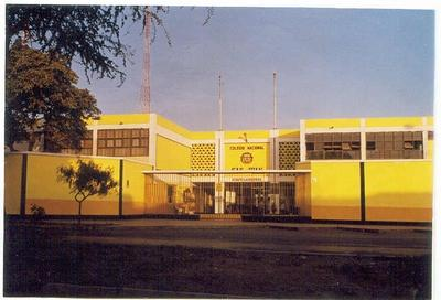 Sesquicentenario Colegio Nacional de San Juan